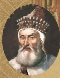 der Doge Lorenzo Priuli.